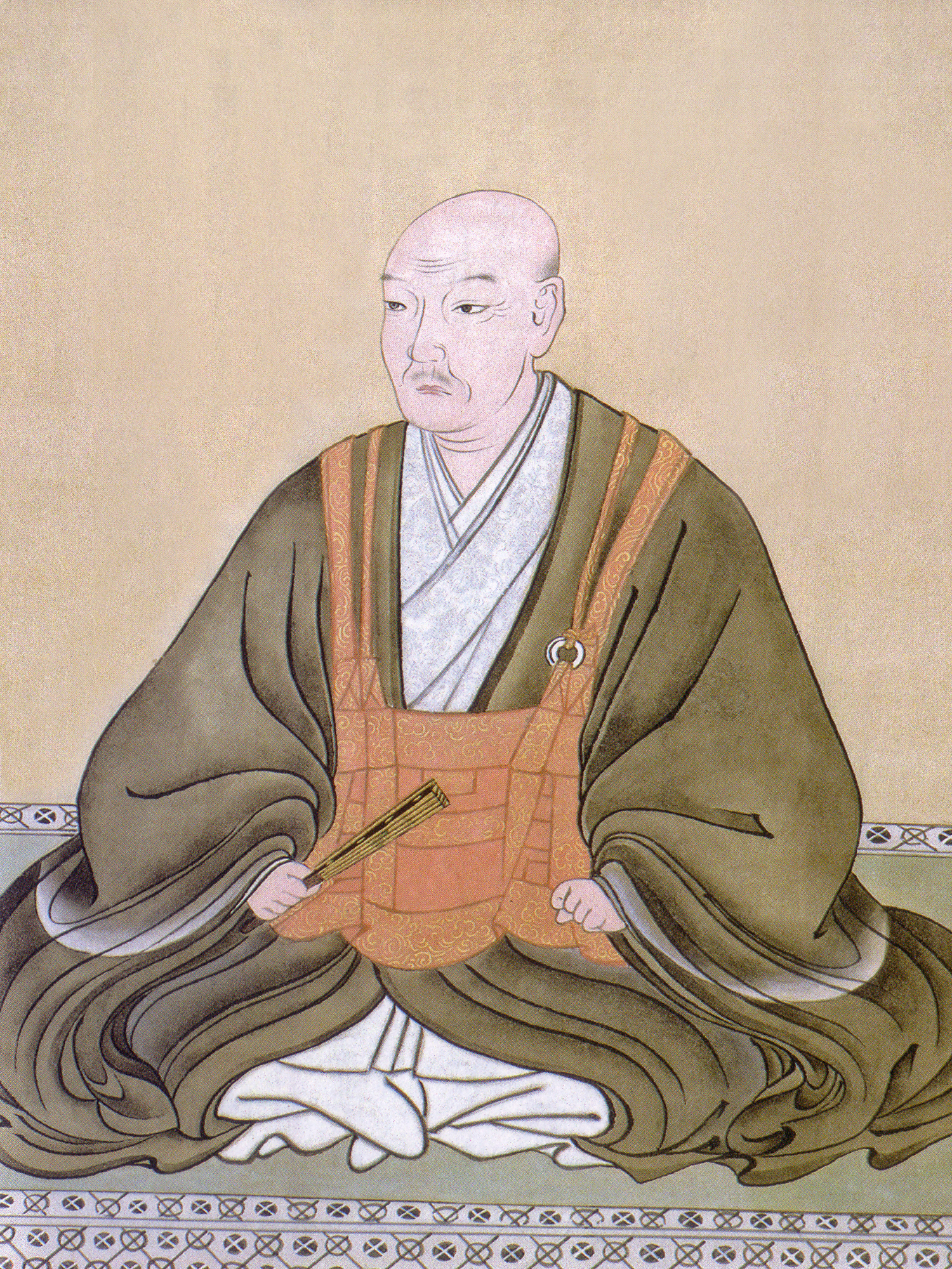 大友宗麟像、模写